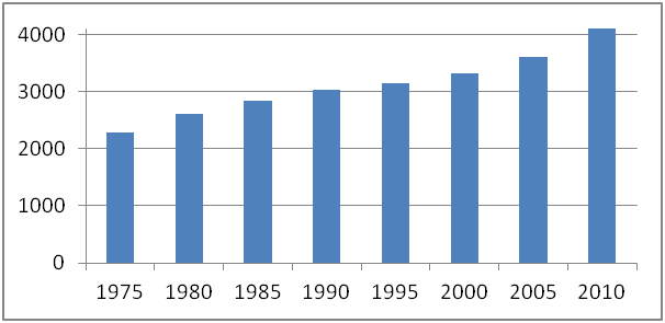 Demografi Jomala, Åland